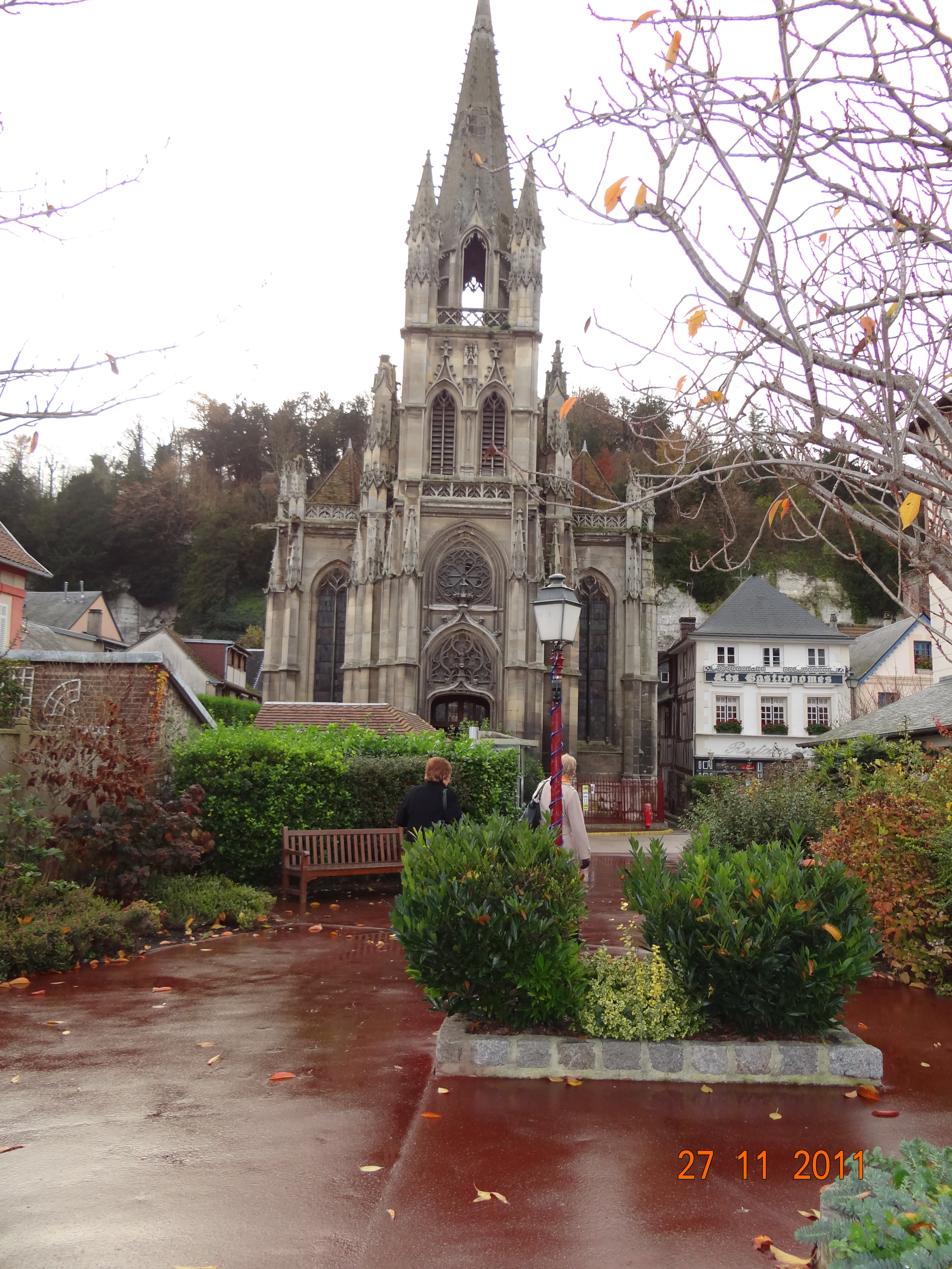 l'église de La Bouille